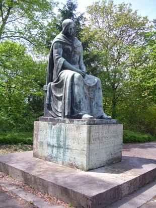 Die Trauernde Noris auf dem Westfriedhof (2010)